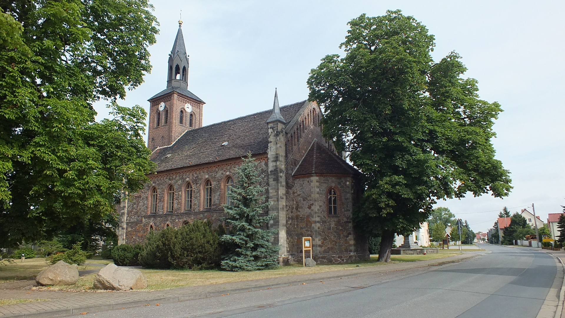 Die denkmalgeschützte Kirche in Züllsdorf, Herzberg (Elster)